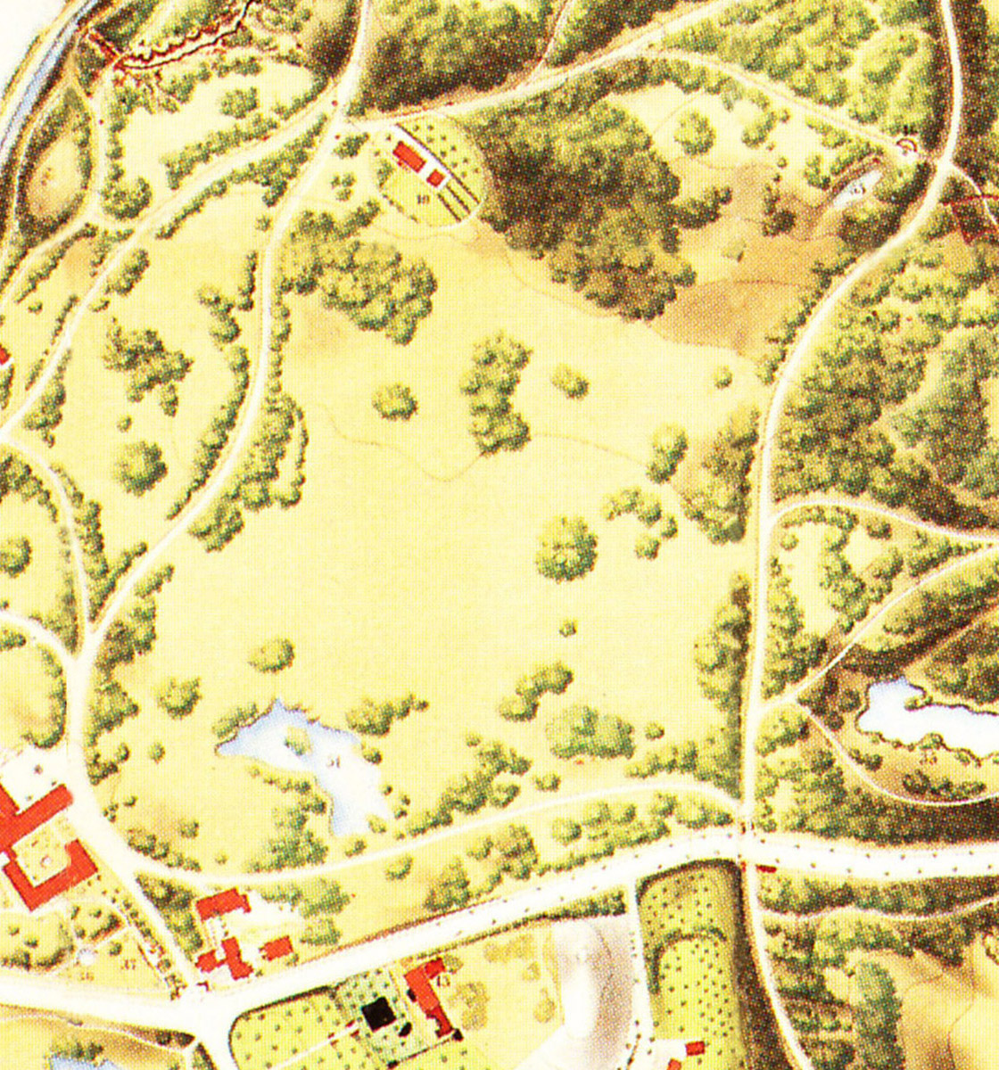 Kraatzplan 1862, Ausschnitt Partie des Großen Wiesengrundes